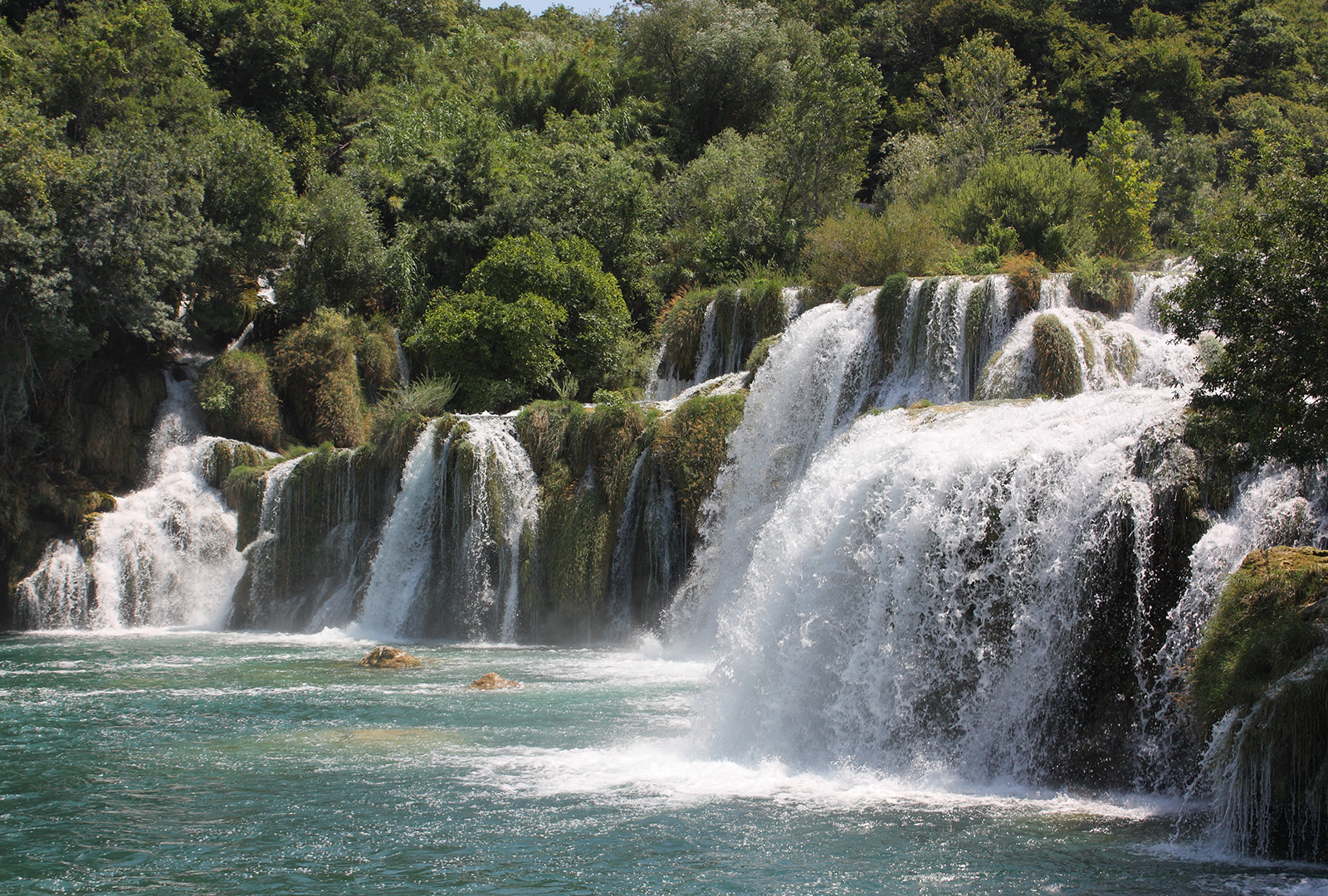 Krka